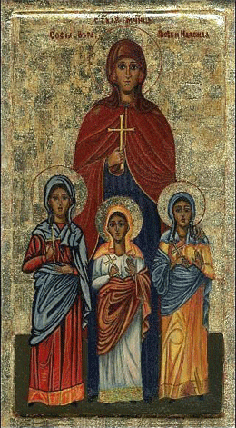 saint Sofia with daughters. Вера, Надежда, Любовь и мать их София